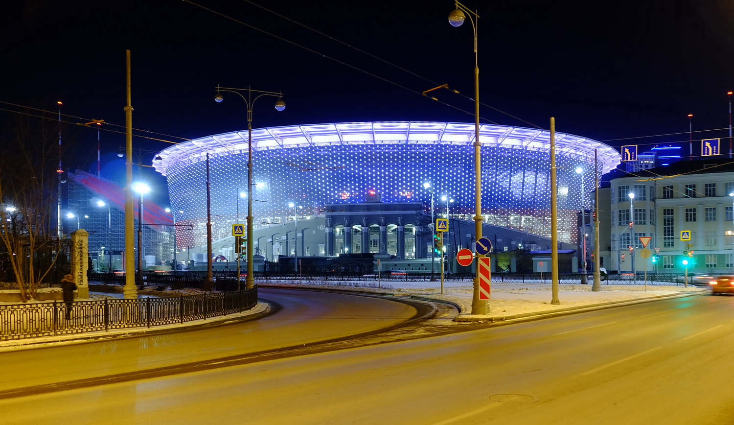 Центральный стадион в Екатеринбурге, февраль 2018